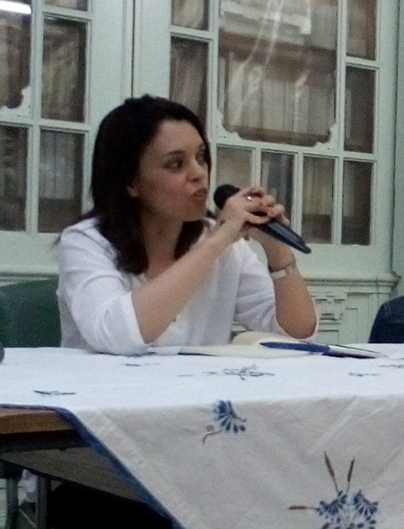 Soumaya Mestiri lors d'une Conférence intitulée: Décoloniser le féminisme: une approche transculturelle, tenue au Centre d'Etudes de Carthage, à Tunis, le 11 juin 2017.